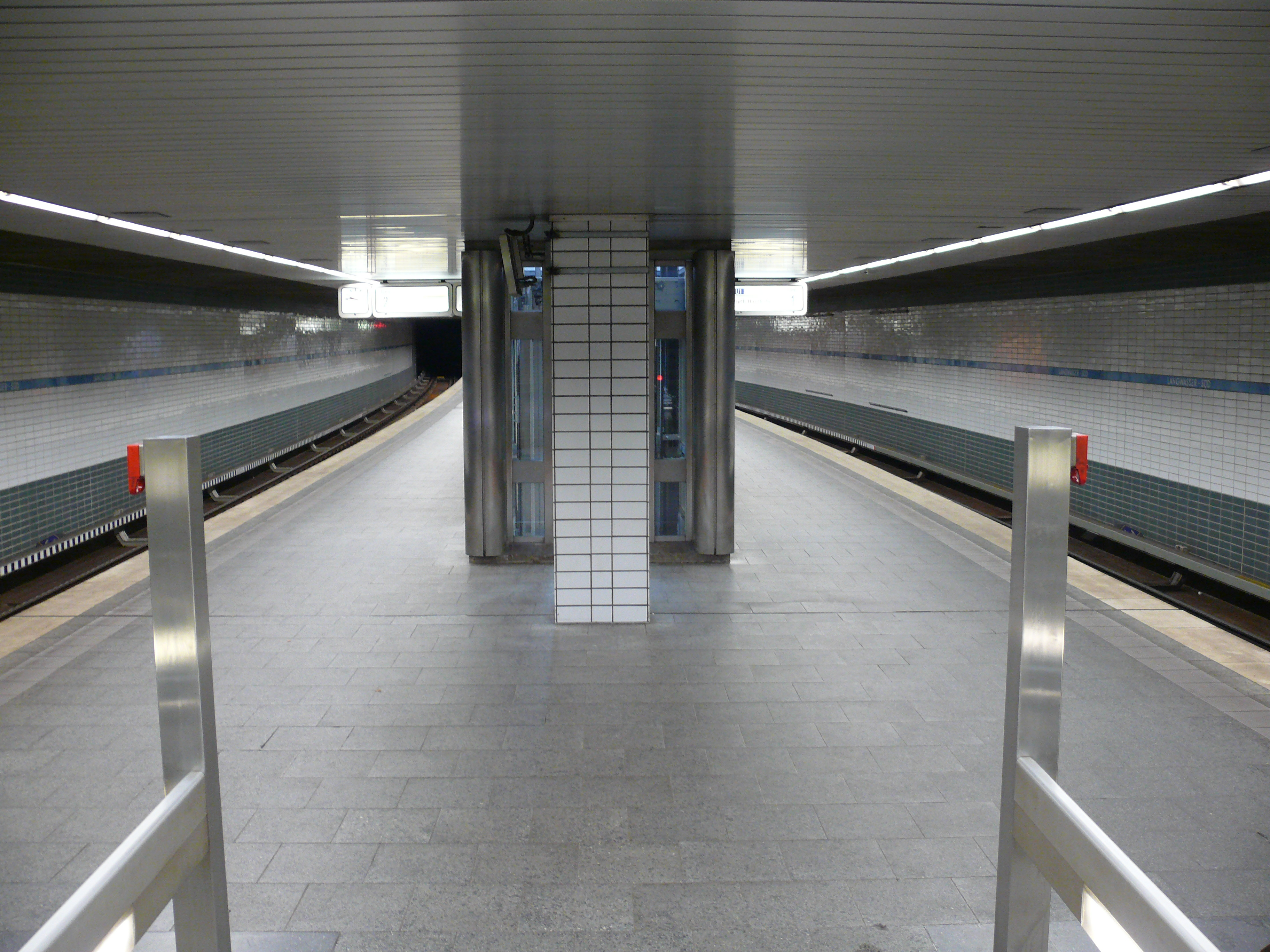 Blick auf die Bahnsteigebene am U-Bahnhof Langwasser Süd in Nürnberg.